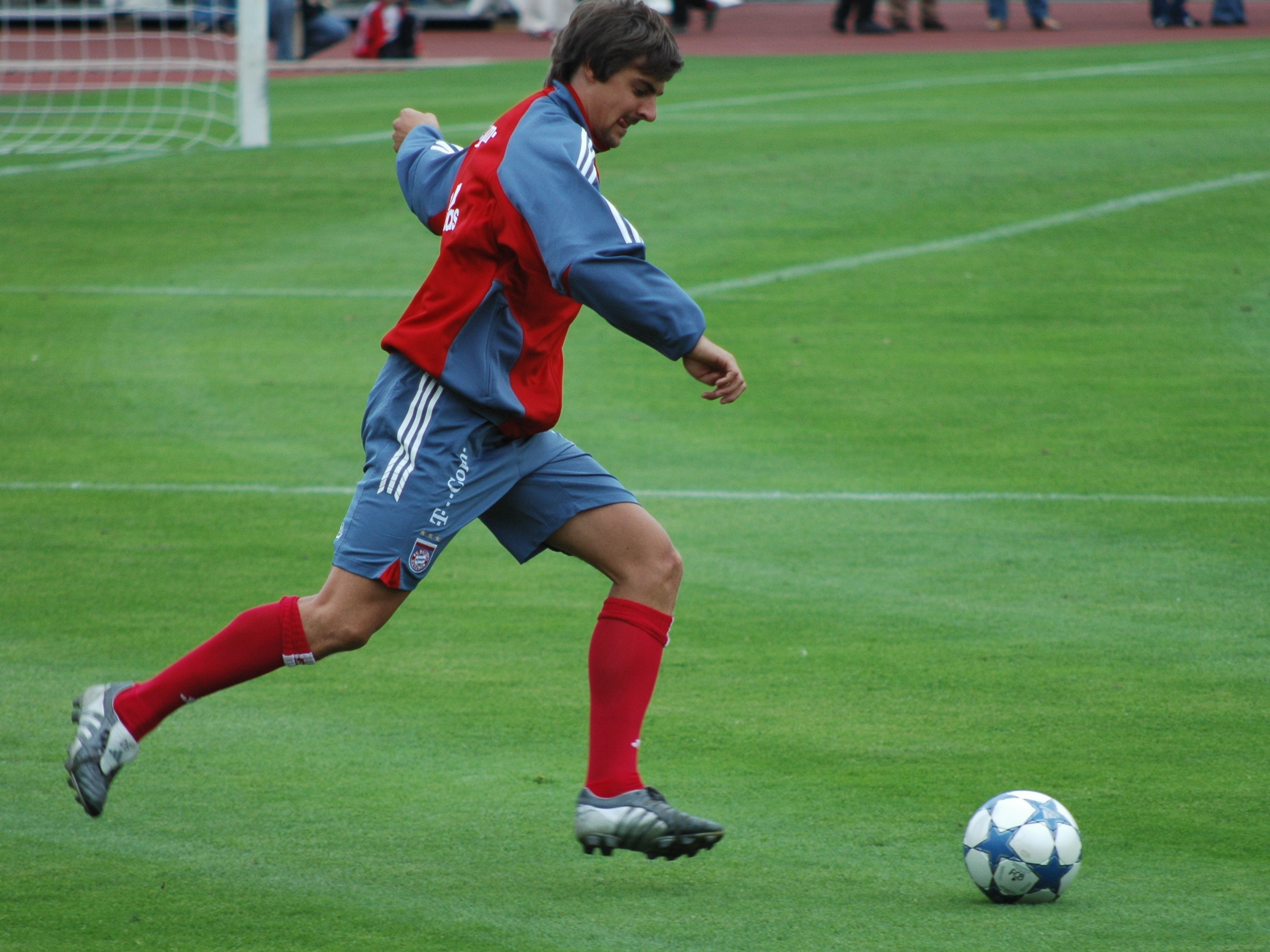 Sebastian Deisler während eines Trainingsspiels in Bonn